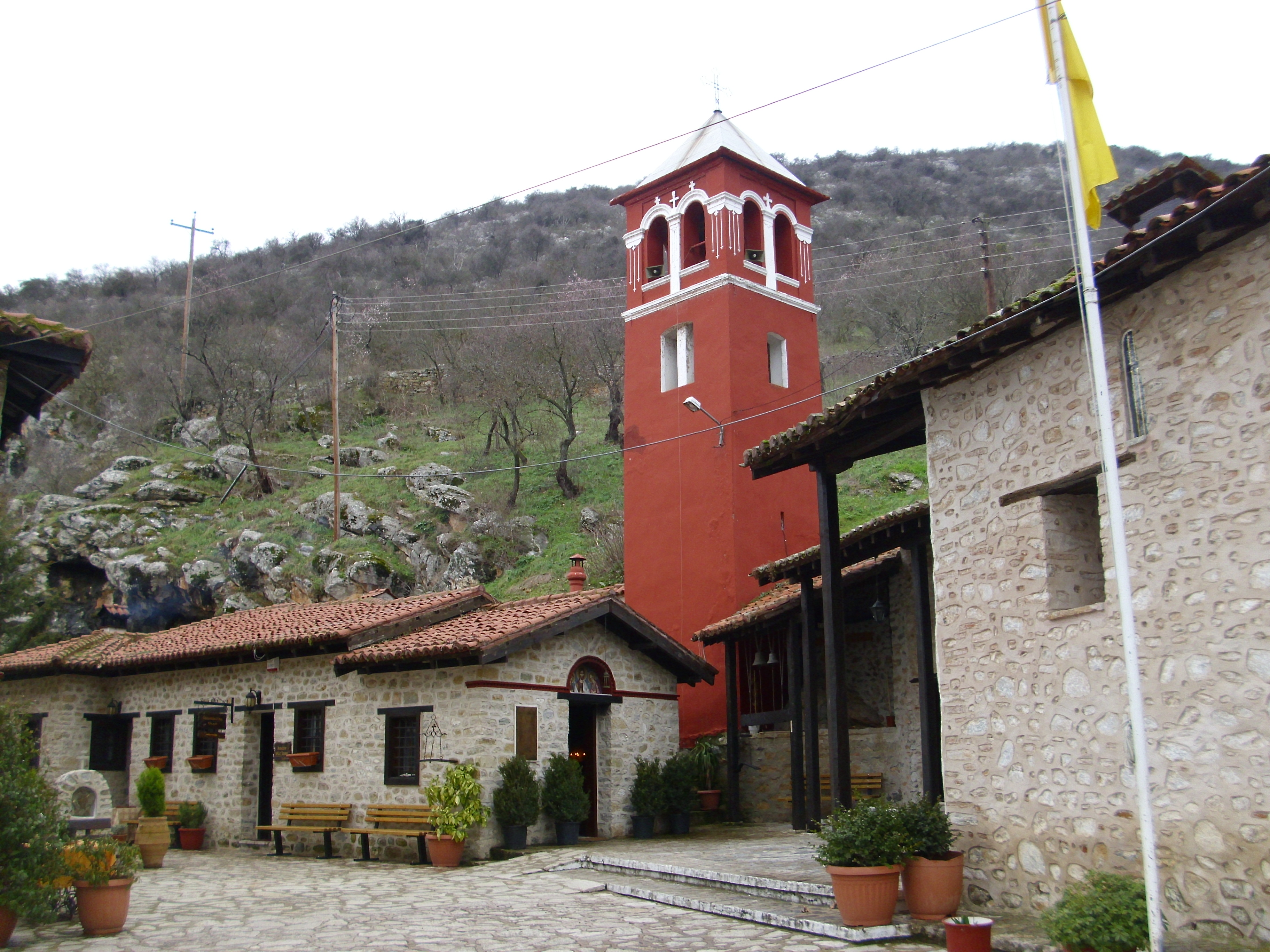 Богородица Мавриотица в Костур.